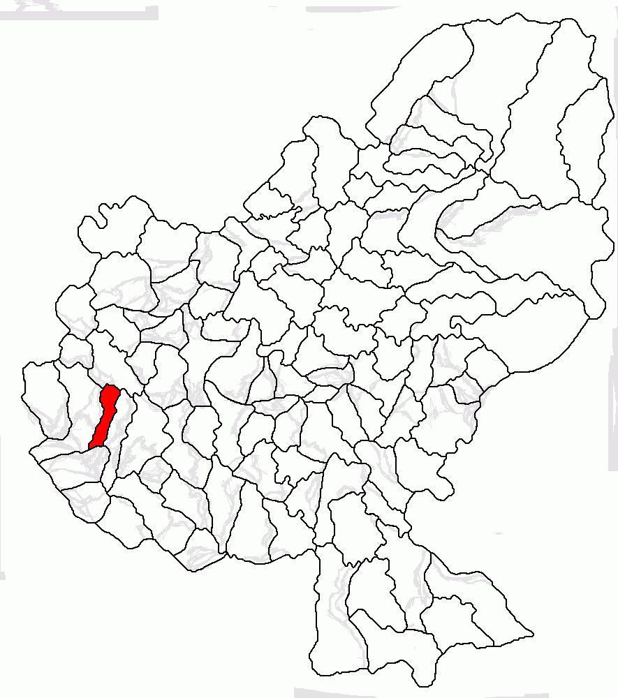 Categorie:Hărţi ale judeţului Mureş